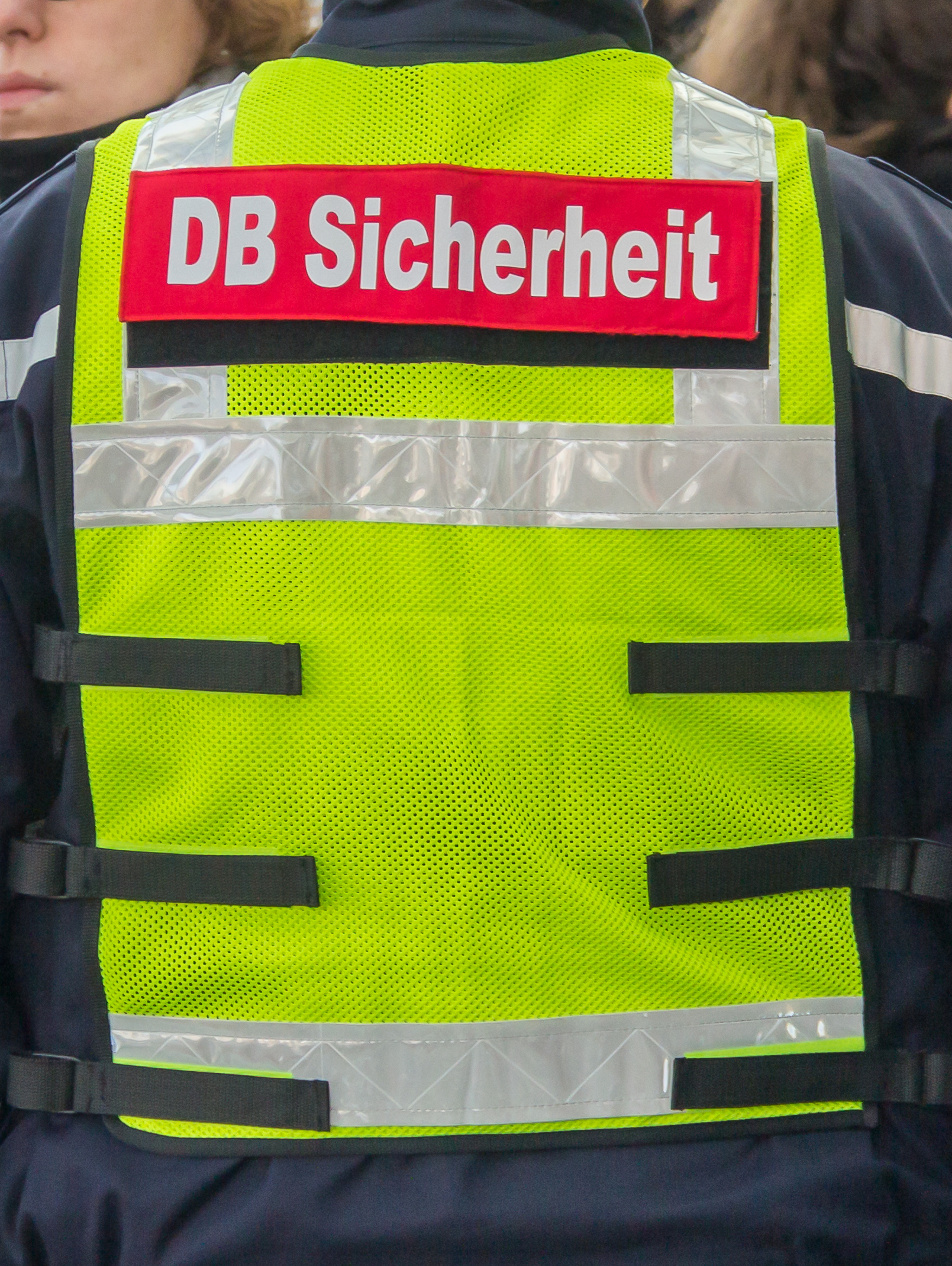 Gegendemonstration "Köln gegen Rechts" (Hashtag: #nopedianrw ) auf dem Breslauer Platz (südlicher Teil) zur Pegida-Demonstration auf dem Breslauer Platz (nördlicher Teil) Foto: Mitarbeiter der DB-Sicherheit auf dem Bahnsteig 11 des Kölner Hauptbahnhofes